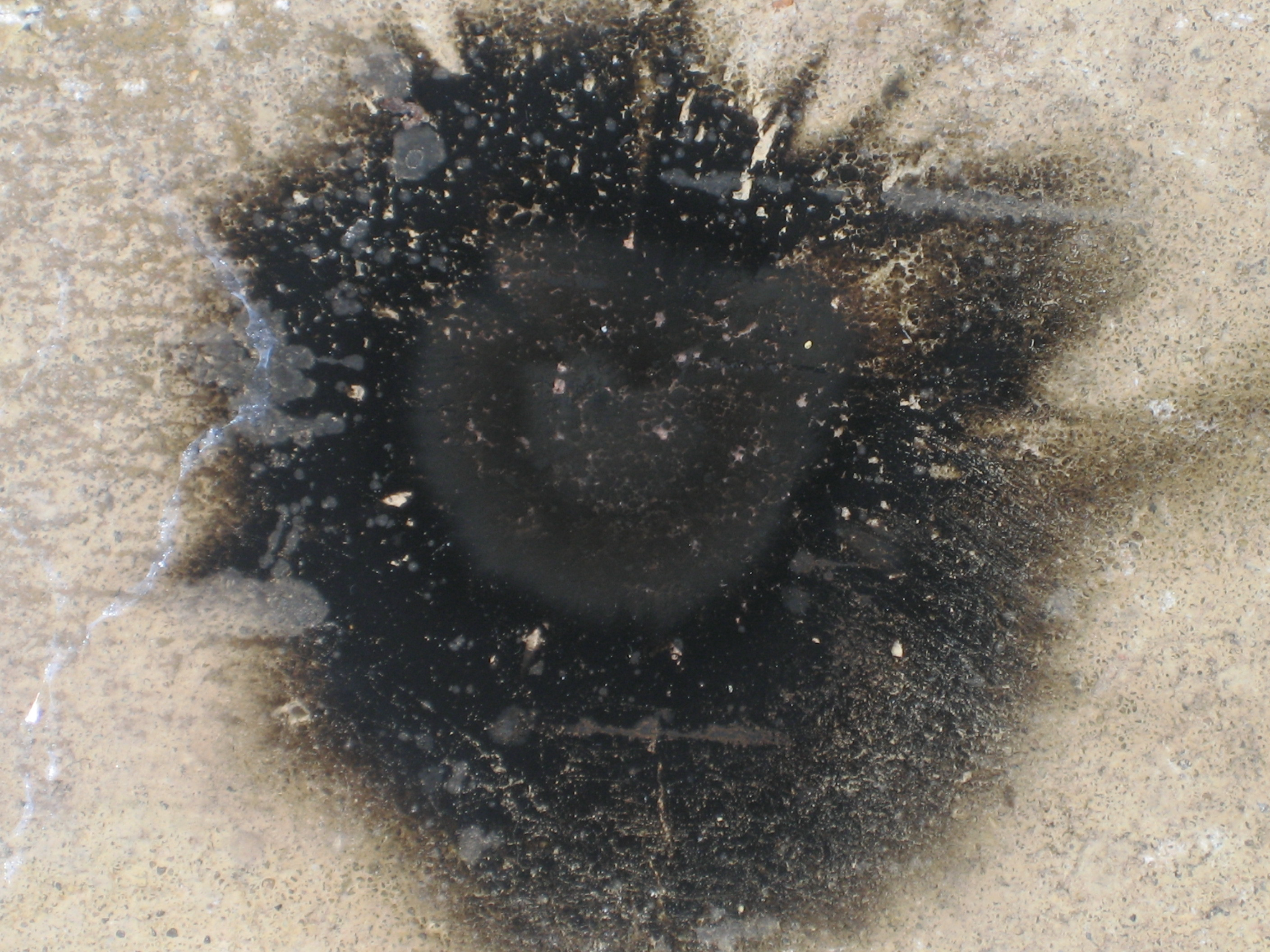 Roet